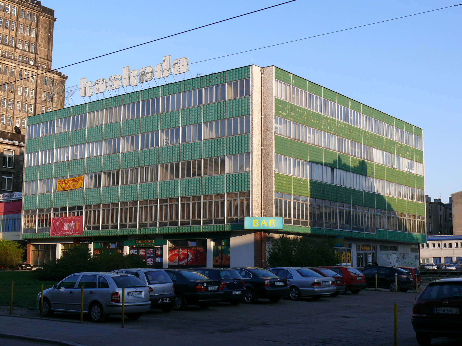 Kaskada w Łodzi